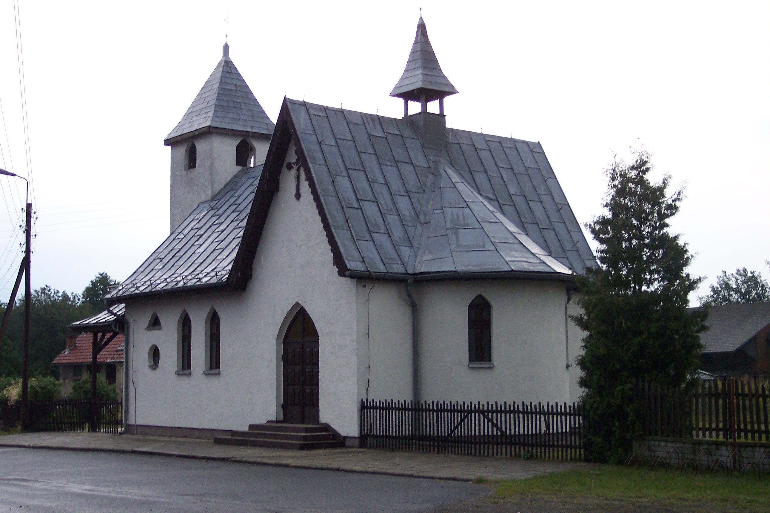 Kaplica w Poczołkowie (woj. opolskie)